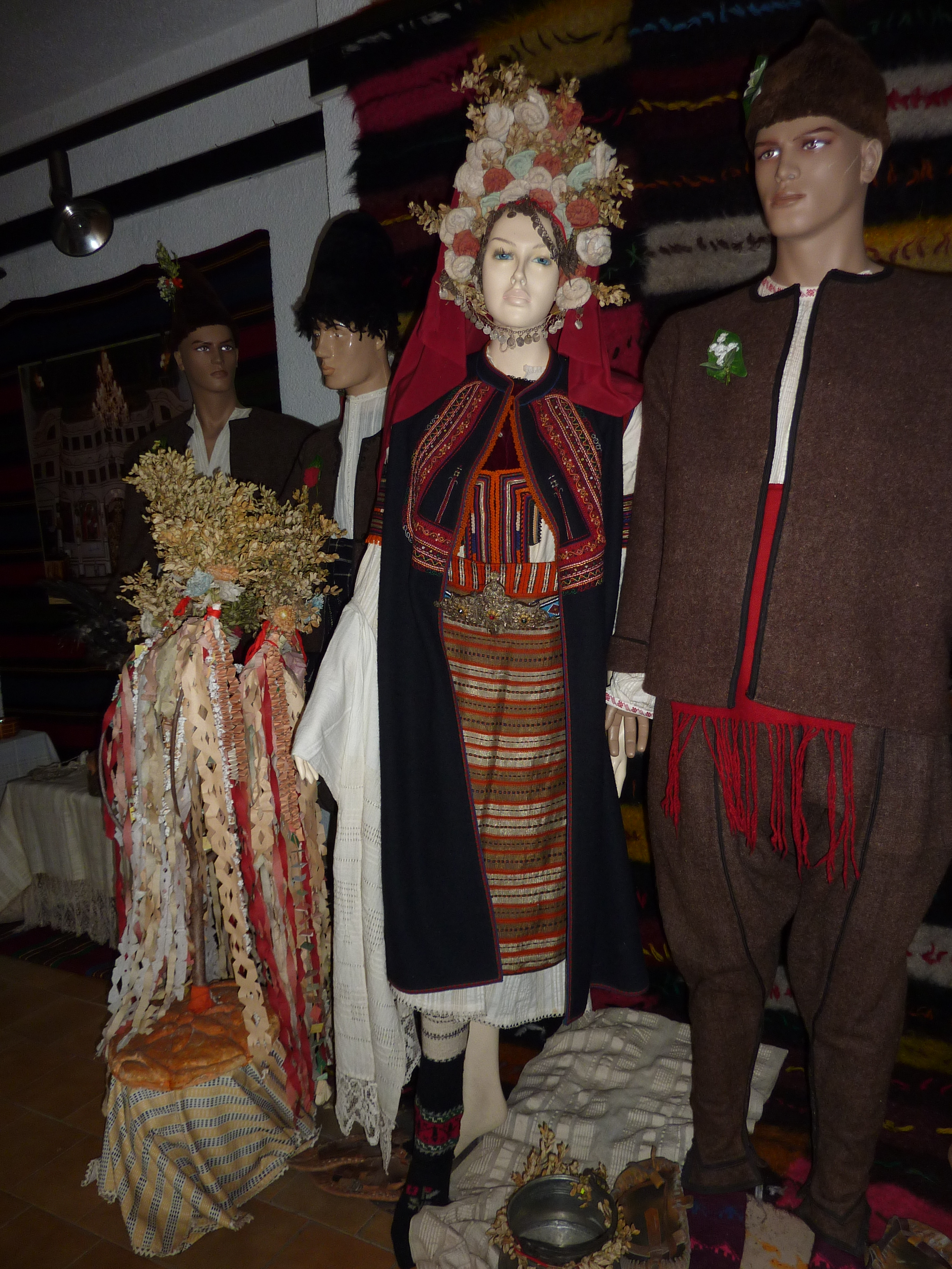 Регионален исторически музей, Кюстендил, част от етнографската експозиция на музея.